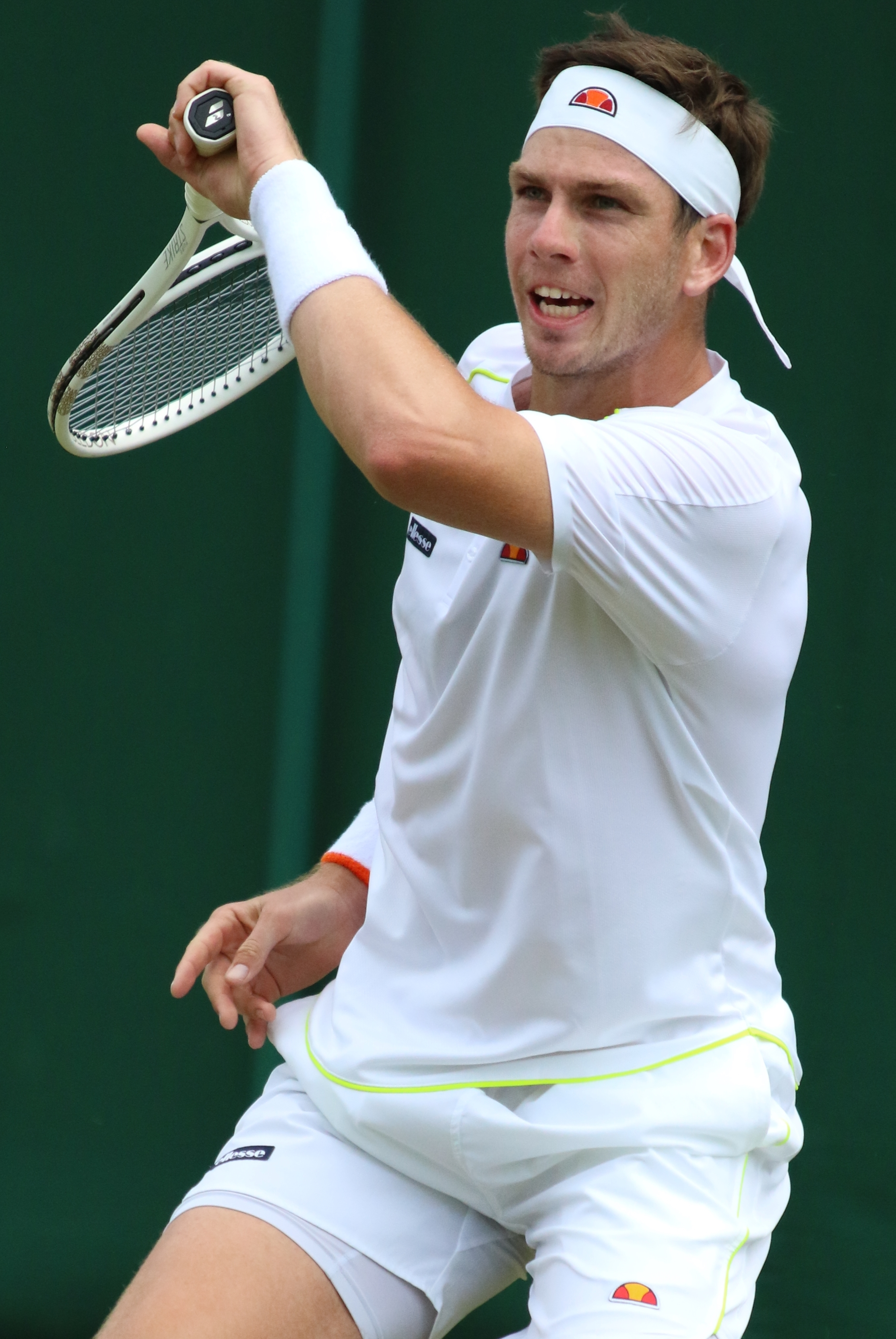 Norrie WM19 (28)